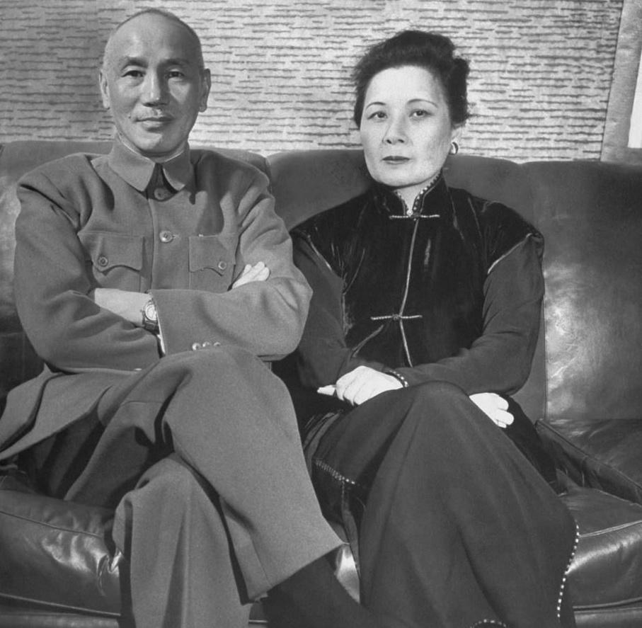 蔣介石與宋美齡，臺灣。